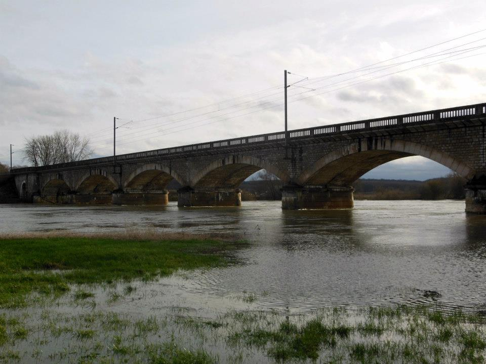 Photographie du pont ferroviaire de Baverans (Jura), enjambant le Doubs.